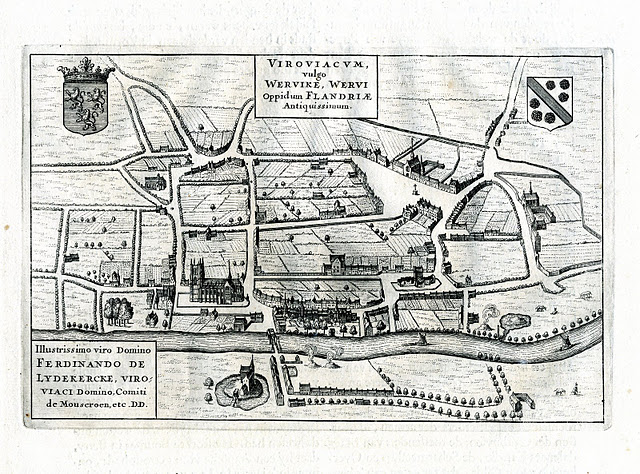 Figuratief plan van Wervik uit 1649, gemaakt door Johannes Blaeu - Gedrukt door Sanderus in Flandria Illustrata.